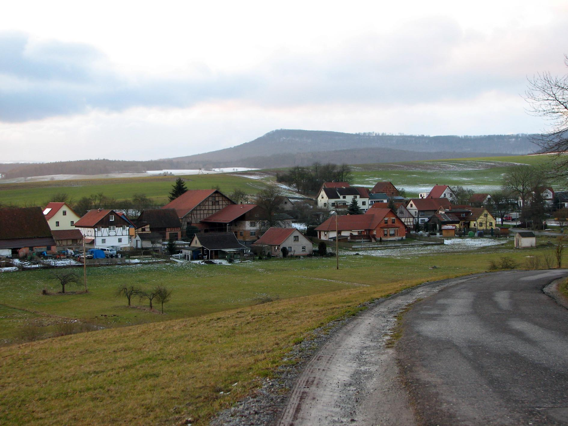 Haselbach (Rhoenblick)